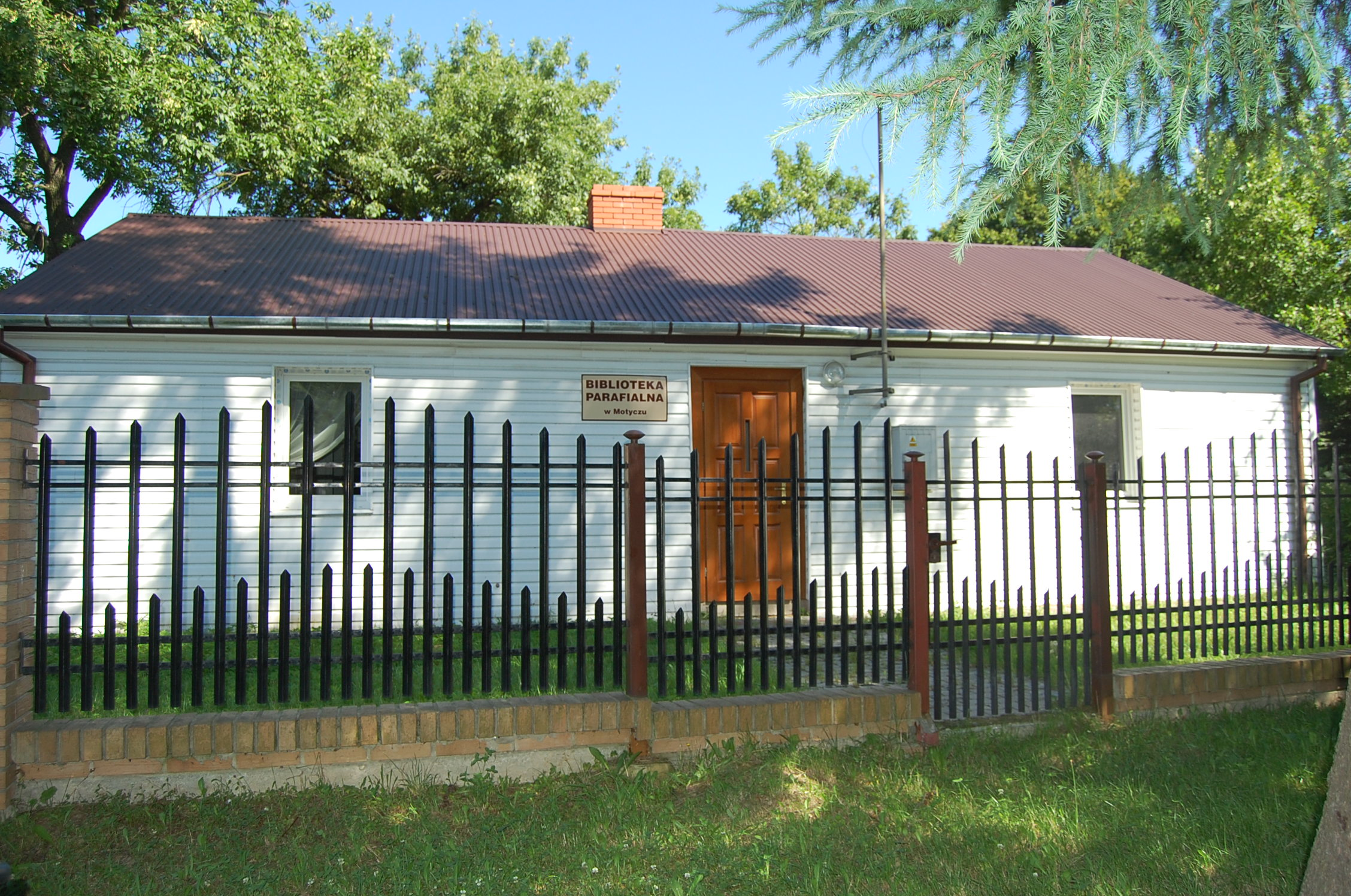 Budynek Biblioteki Parafialnej w Motyczu